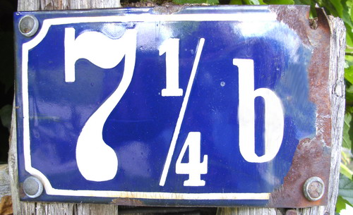 Bruchteilshausnummer mit zusätzlichem Buchstaben